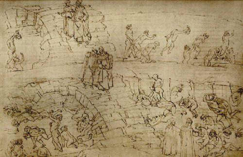 Inf._29_Sandro_Botticelli,_alchimisti